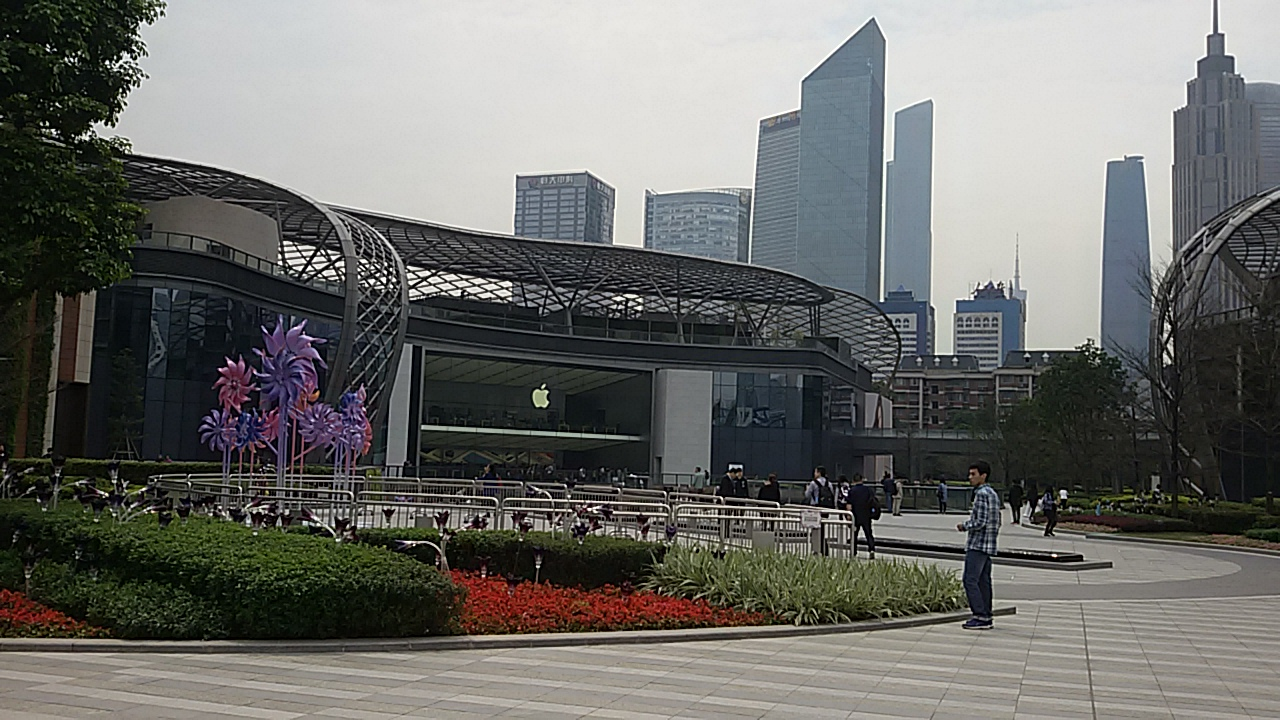 粵語: 天環廣場嘅大廣場